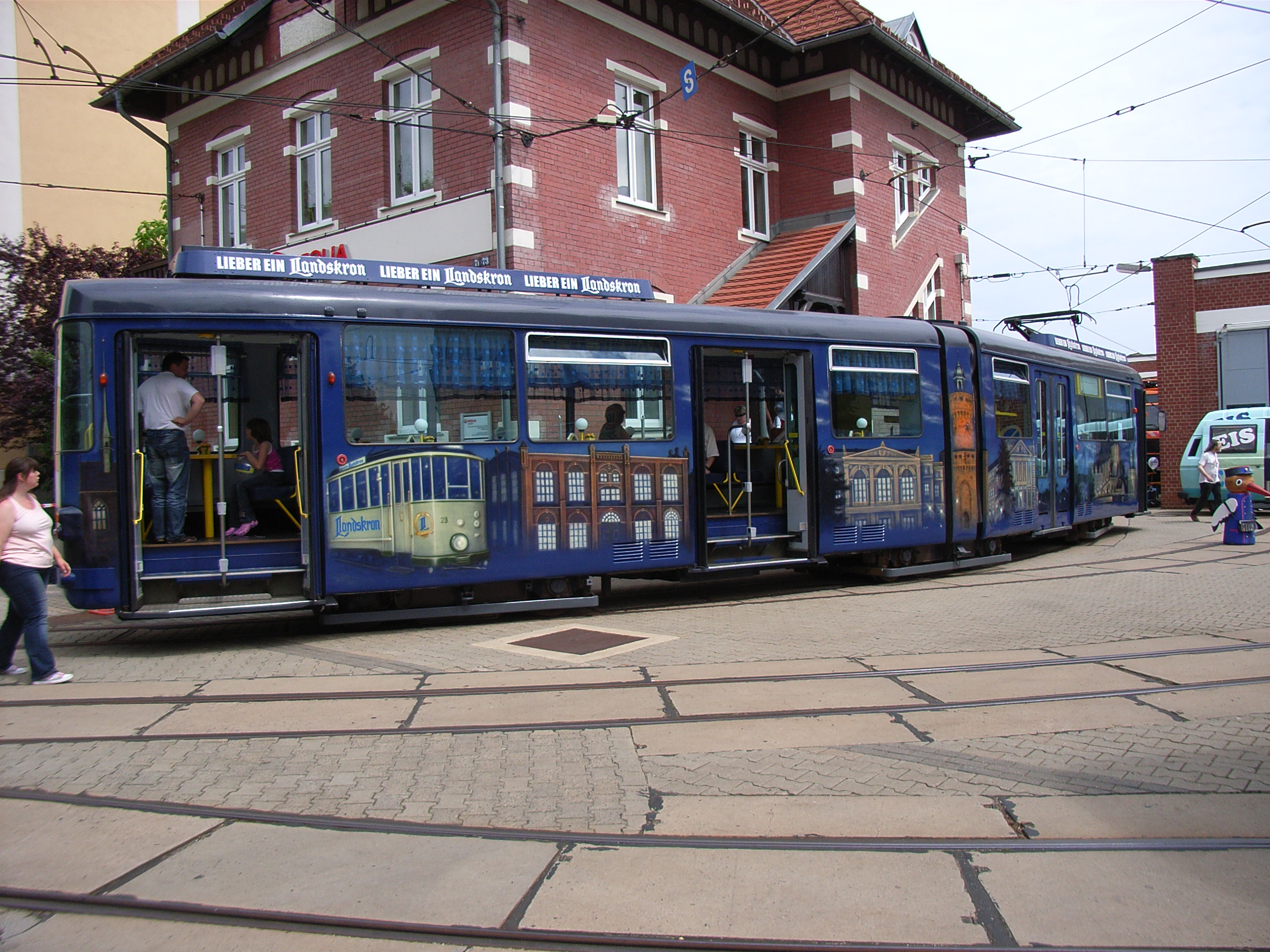 Seitenansicht des Straßenbahn-Partywagens Hopfenexpress der Görlitzer Verkehrsbetriebe, DUEWAG GT6